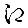 ファイルの概要 音韻「え」のひらがなの一種（なお、 /ye/ が表記されていた時代にも使われた）。Kzhr作成。CC-By-Sa-2.5によって提供される。 One of the letter of the phoneme "え". Kzhr's File. や行のえについては相当する仮名がコードに存在しないので、画像で示した。字母は「江」で、音韻は /ye/ 或は国際音声字母で子音は硬口蓋接近音 [j]なので、[je]。10世紀前半ごろには使用されなくなっているため五十音やいろはには含まれない。 One of the letter of the phoneme "え". sers's File.